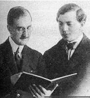 Enrique Soro con Luigi Stefano Giarda, junio, 1921